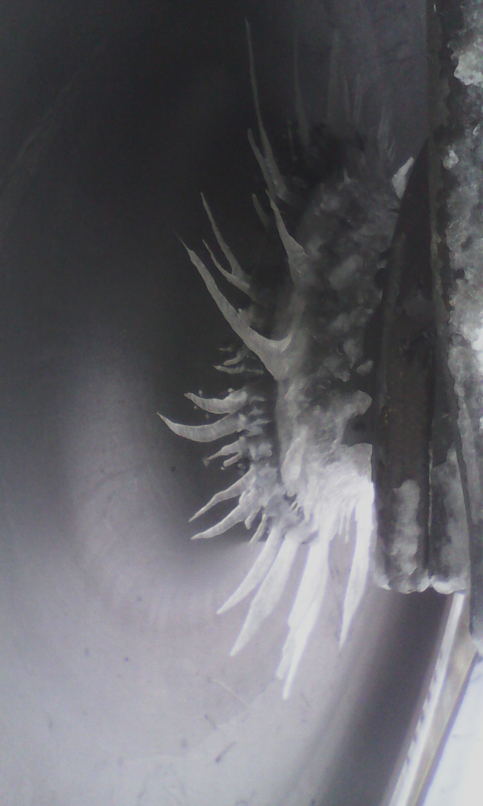 г. Челябинск, 28 октября 2017 г.